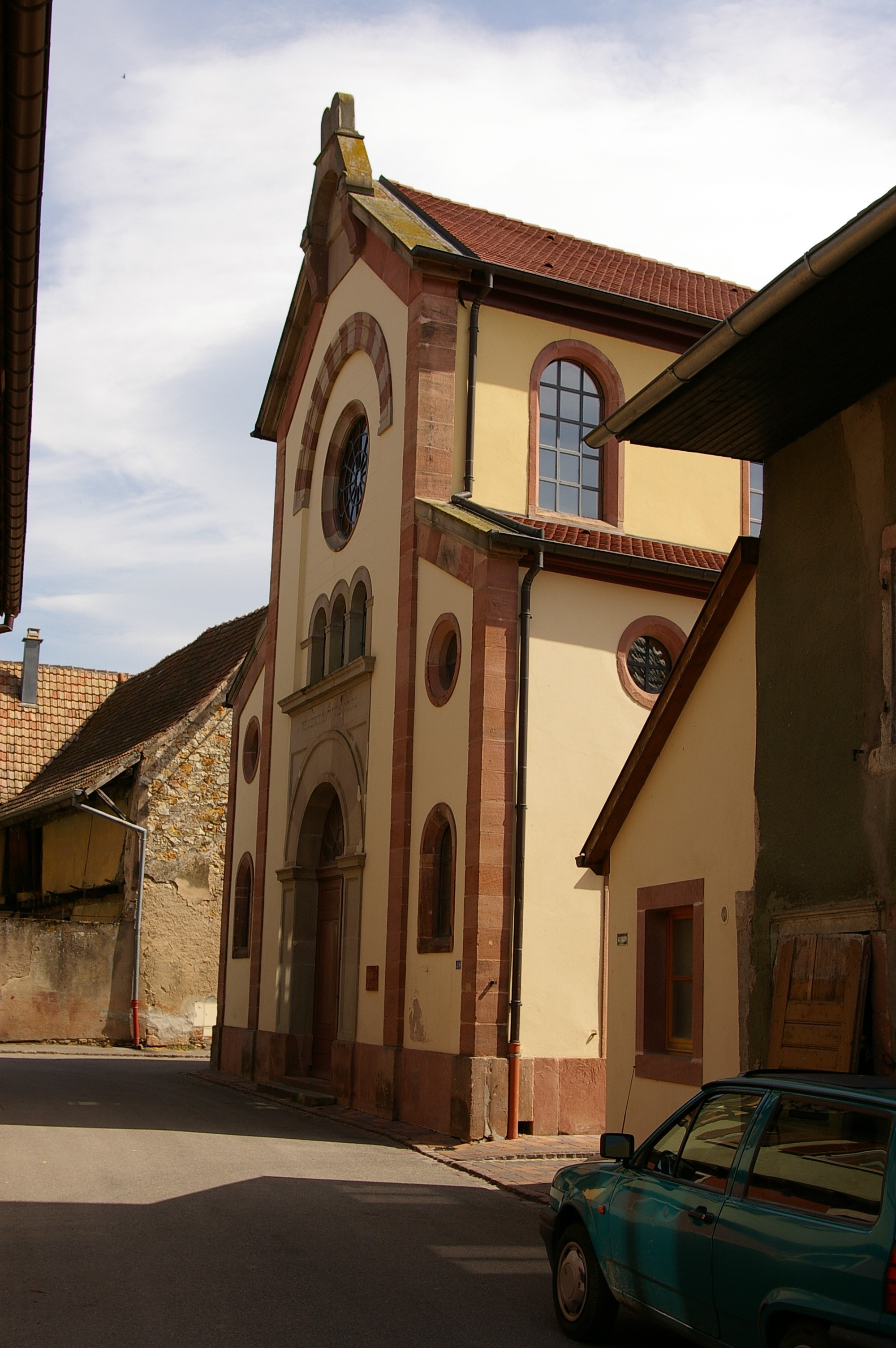 Synagogue de Bergheim, aujourd'hui salle polyvalente